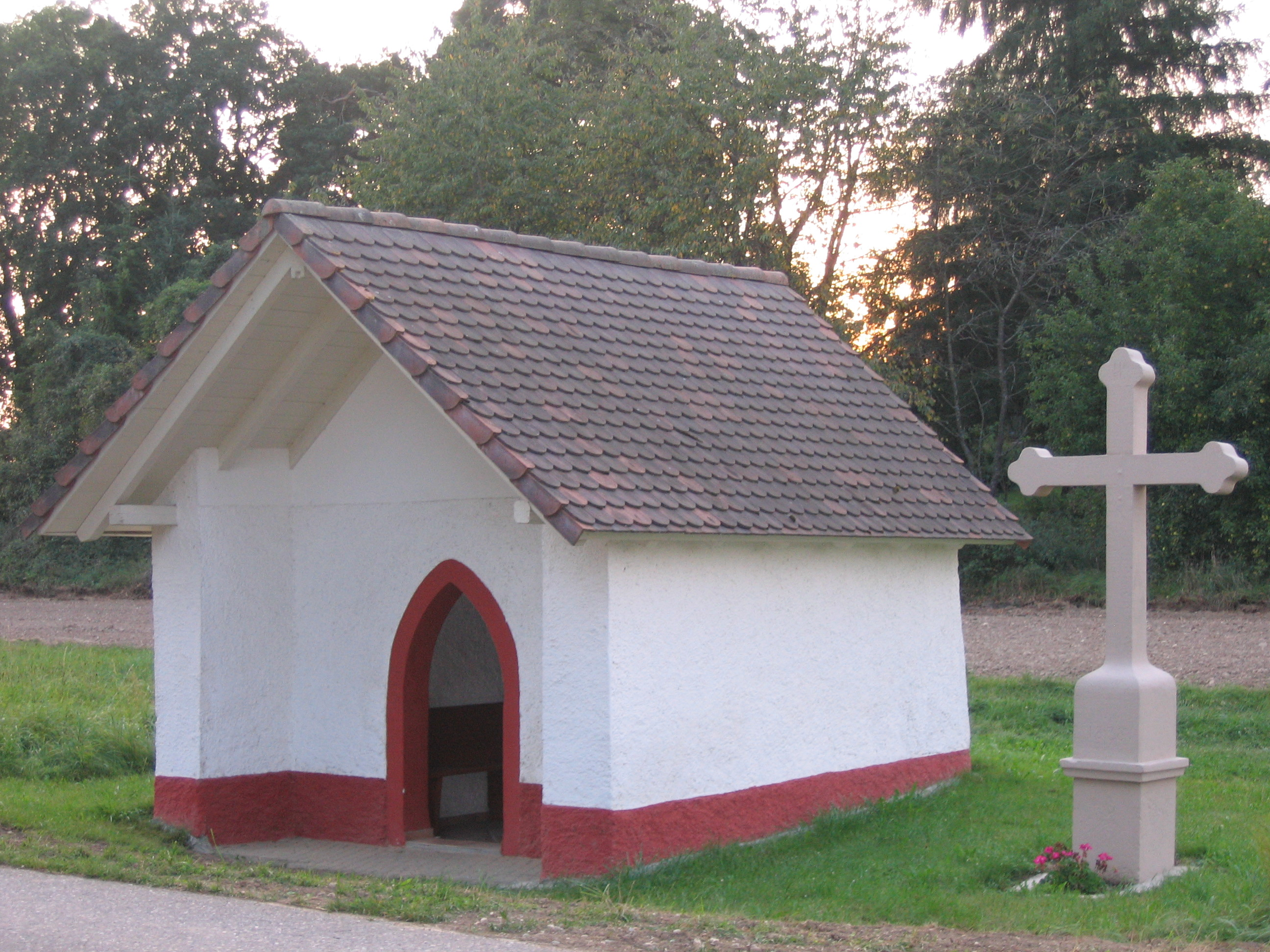 Kapelle bei Geißlingen, Klettgau (Gemeinde), Landkreis Waldshut, Baden-Württemberg.